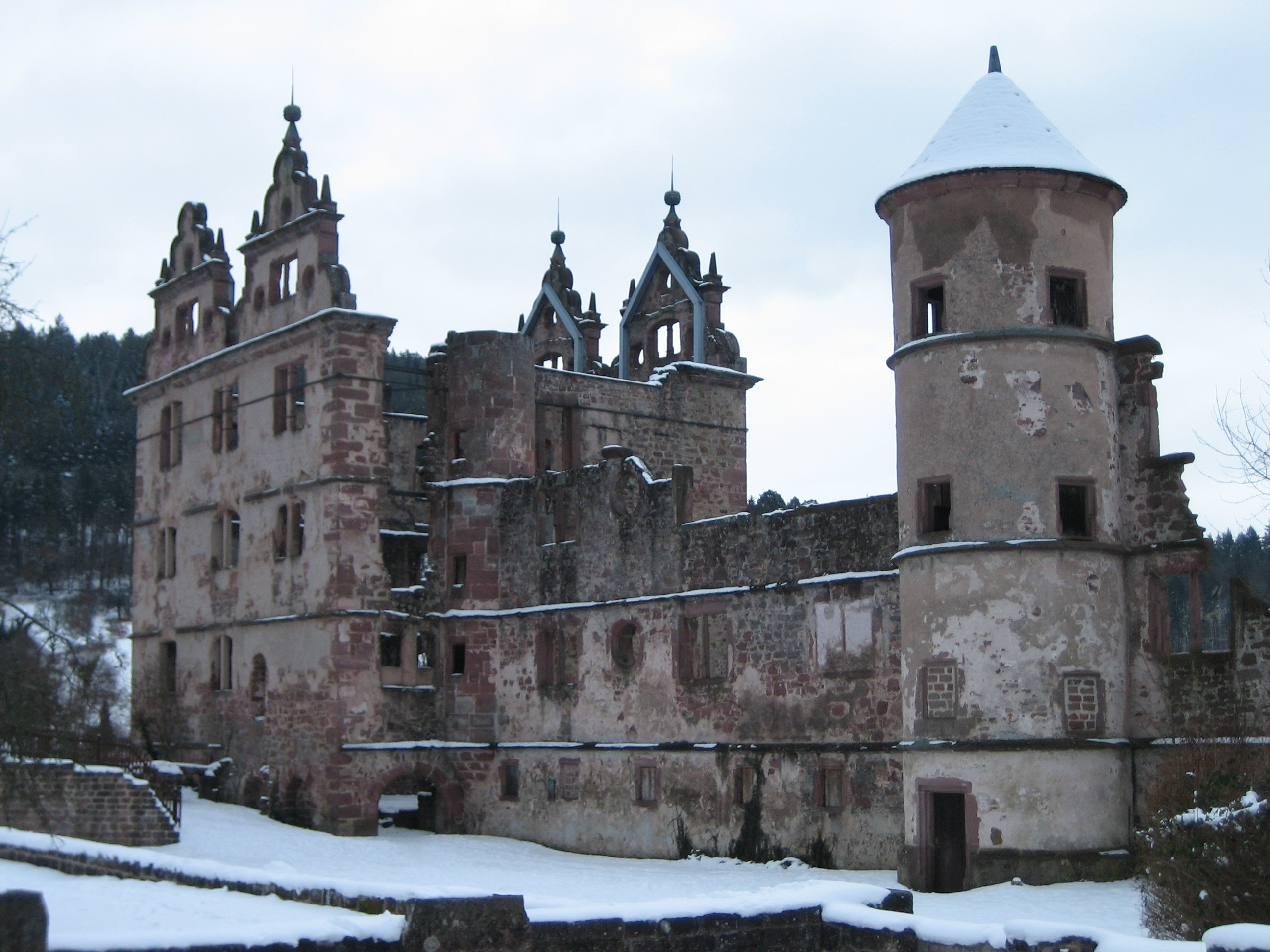 Kloster Hirsau: Schlossruine